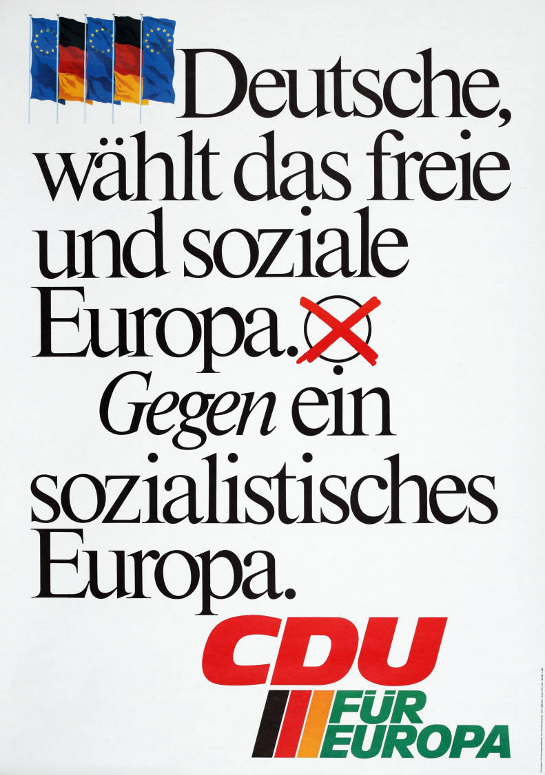 Deutsche, wählt das freie und soziale Europa. Gegen ein sozialistisches Europa. CDU Für Europa Abbildung: Europa- und Deutschlandfahnen Plakatart: Motiv-/Textplakat Auftraggeber: CDU-Bundesgeschäftsstelle, Abt. Öffentlichkeitsarbeit, Konrad-Adenauer-Haus, Bonn Drucker_Druckart_Druckort: KVD, Köln Objekt-Signatur: 10-030 : 2 Bestand: Europawahlplakate (10-030) GliederungBestand10-18: Europawahlplakate (10-030) » Europawahl am 10.6.1979 » CDU Lizenz: KAS/ACDP 10-030 : 2 CC-BY-SA 3.0 DE